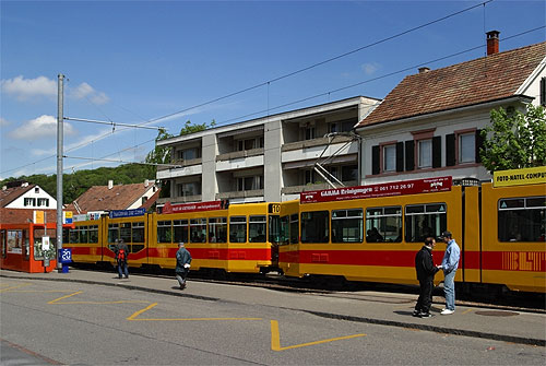 Tramhaltestelle und Busbahnhof Bottmingen (Dorf)